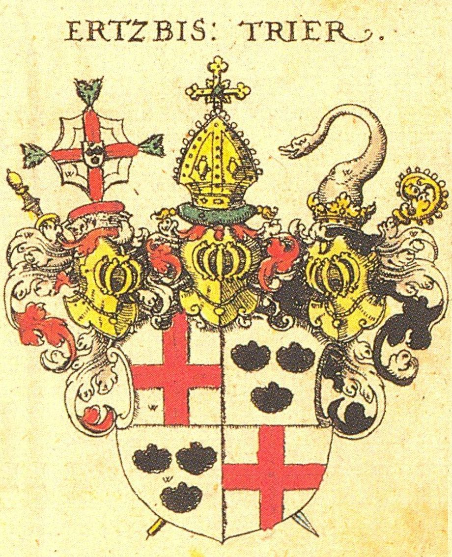 Siebmachers Wappenbuch, Blatt 3, Erzbistum Trier, 1605